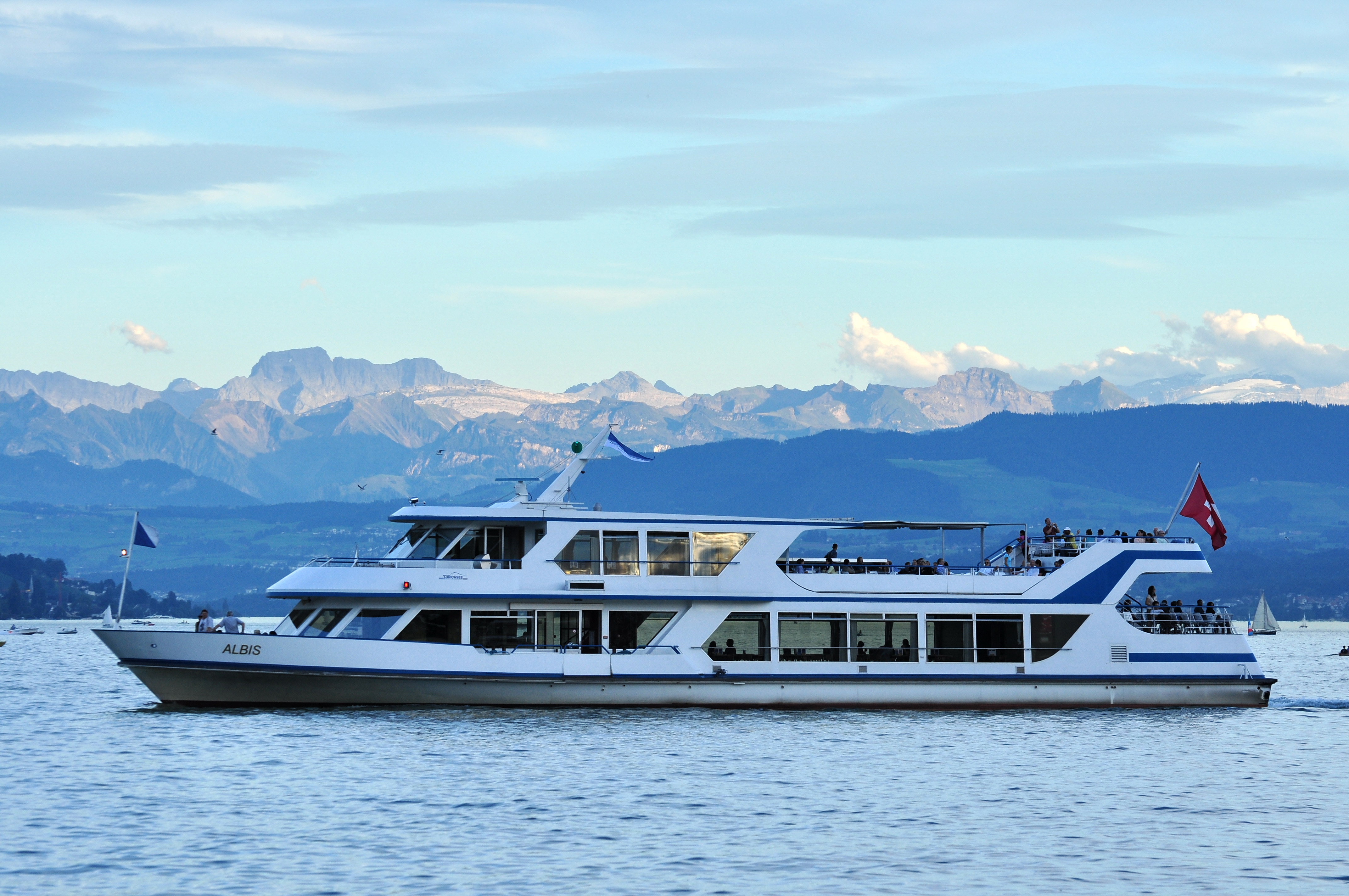 Glarner Alpen and Zürichsee, as seen from Saffa-Insel in Zürich-Wollishofen (Switzerland), Zürichsee-Schiffahrtsgesellschaft (ZSG) MS Albis on Zürichsee (Lake Zürich) in the foreground.